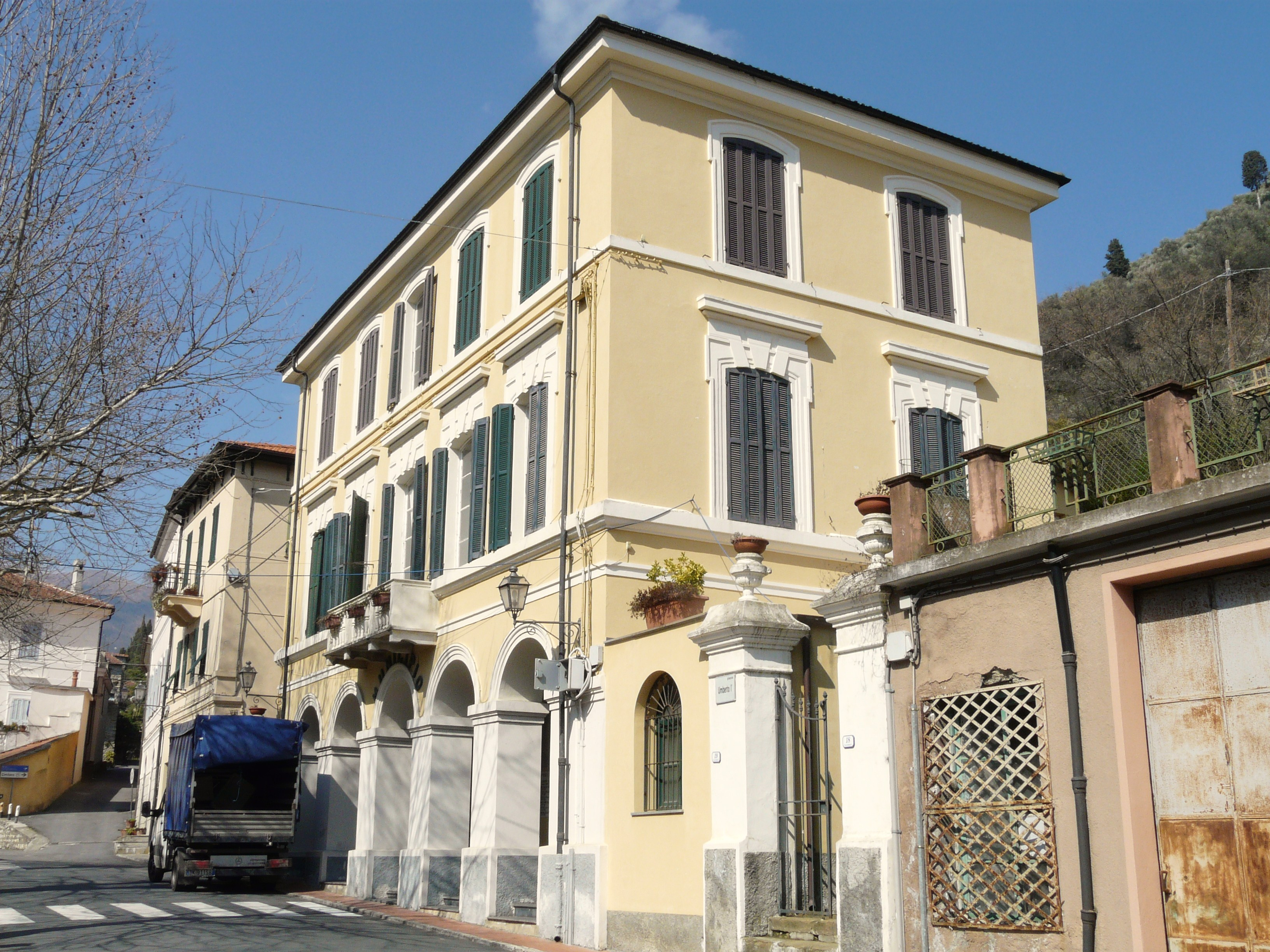 Municipio, Prelà, Liguria, Italia